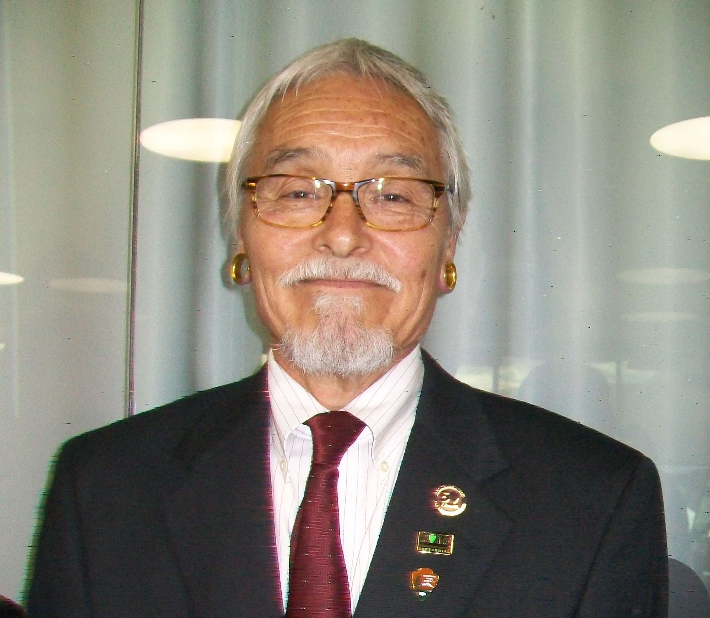 Главный специалист по культурной антропологии и связям с коренными народностями Службы национальных парков США Джо Уоткинс, Нация Чокто (штат Оклахома) в Ельцин-центре после лекции.